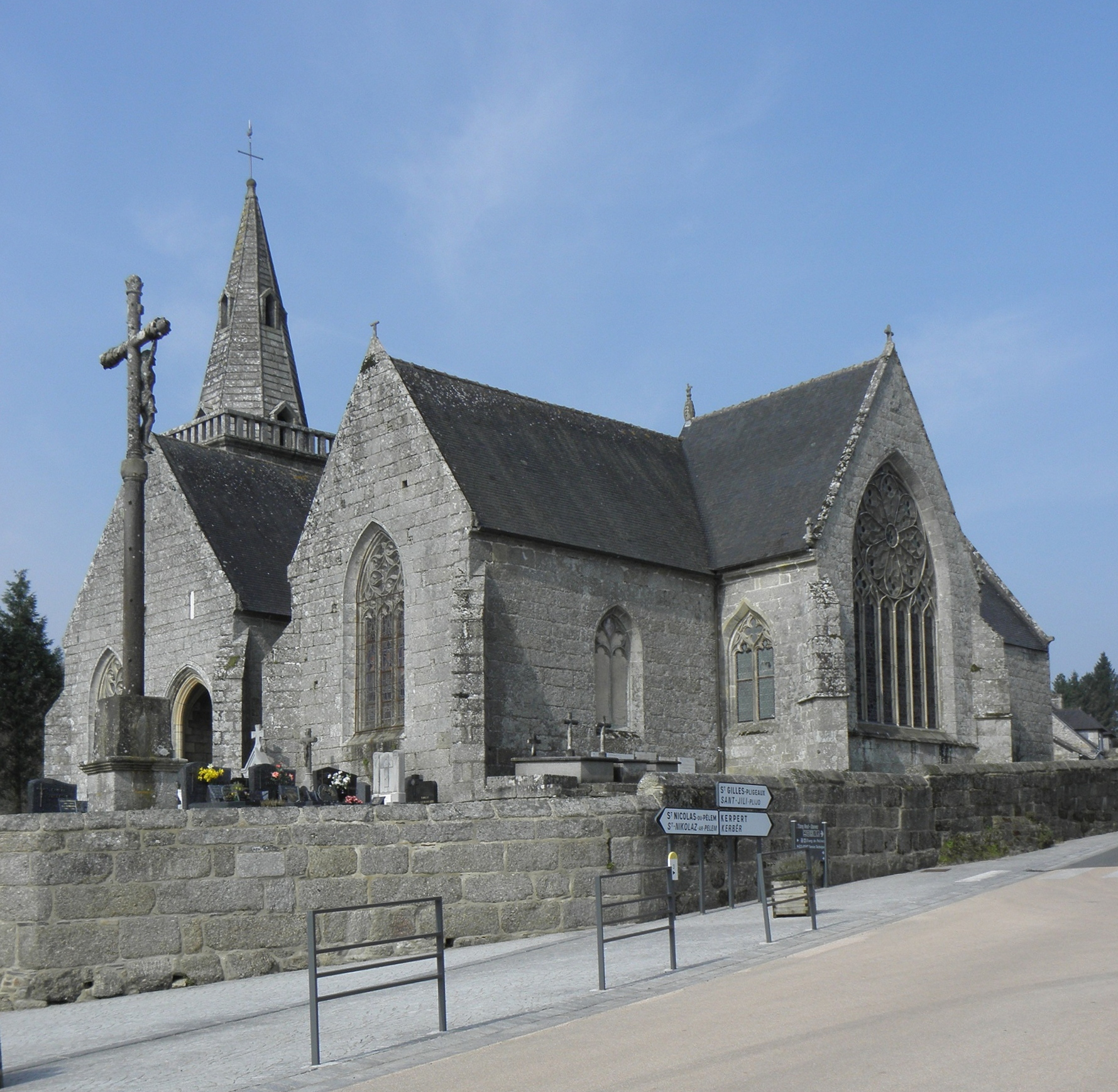 Église Notre-Dame sise à Canihuel (22). Chevet et flanc sud.